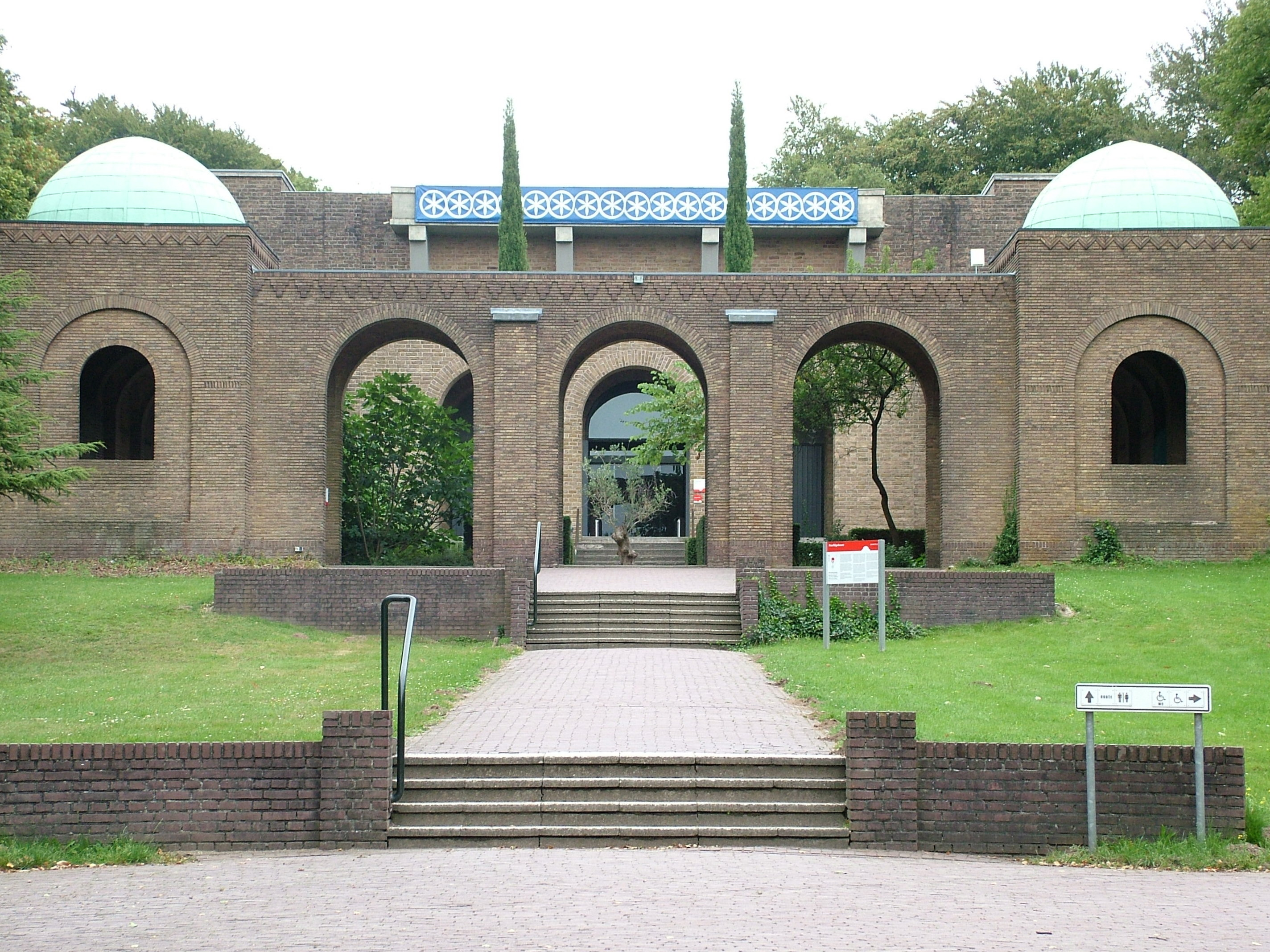 Museumpark Orientalis bei Nimwegen. Hauptgebäude.